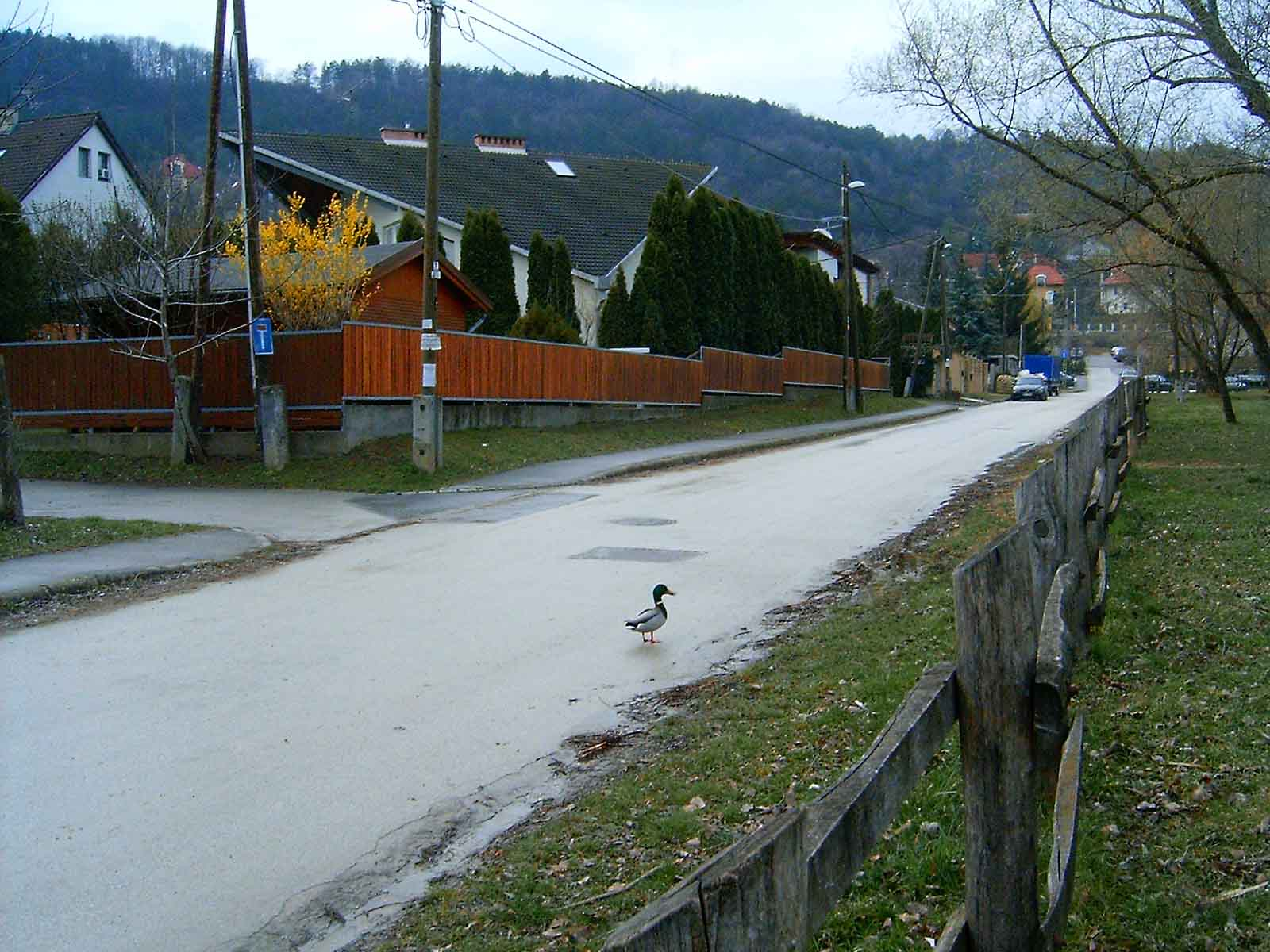 A Gőtés-tó környéke tőkés récével (Budapest, III. kerület, a békásmegyeri lakótelep mellett)